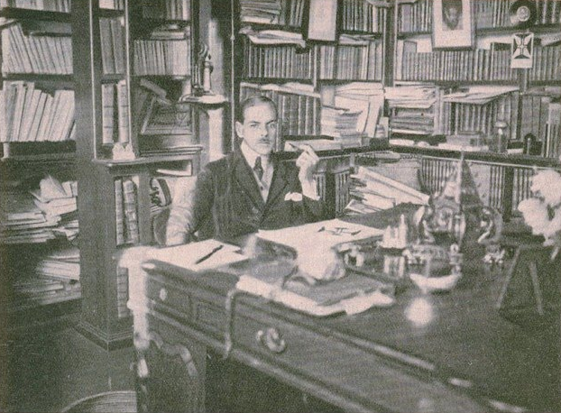 Photo du poète Afonso Lopes Vieira dans son cabinet de travail en 1921